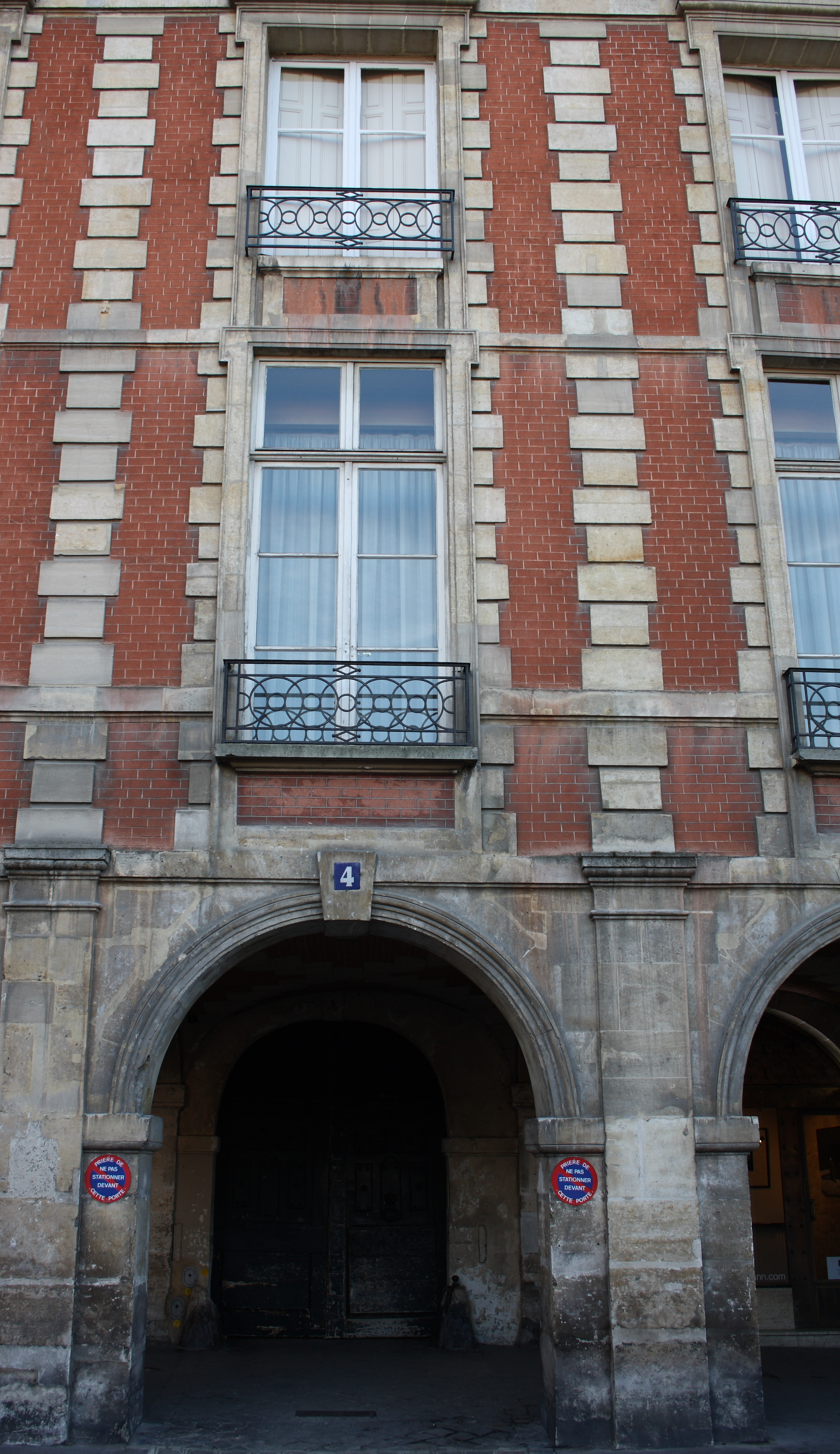 Paris, 4 place des Vosges